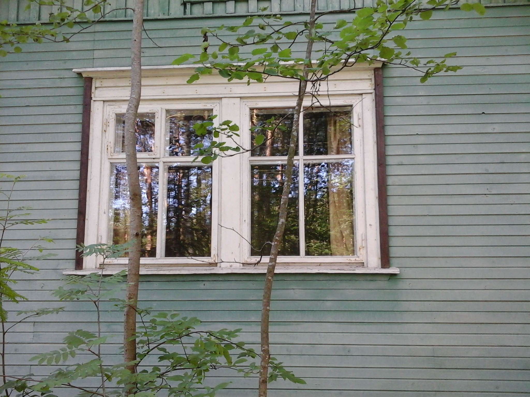 Окно комнаты Анны Ахматовой в "Будке". Комарово. Фотография 2014 года